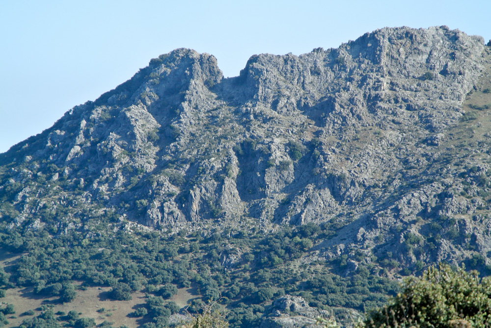 Sierra del Tablón